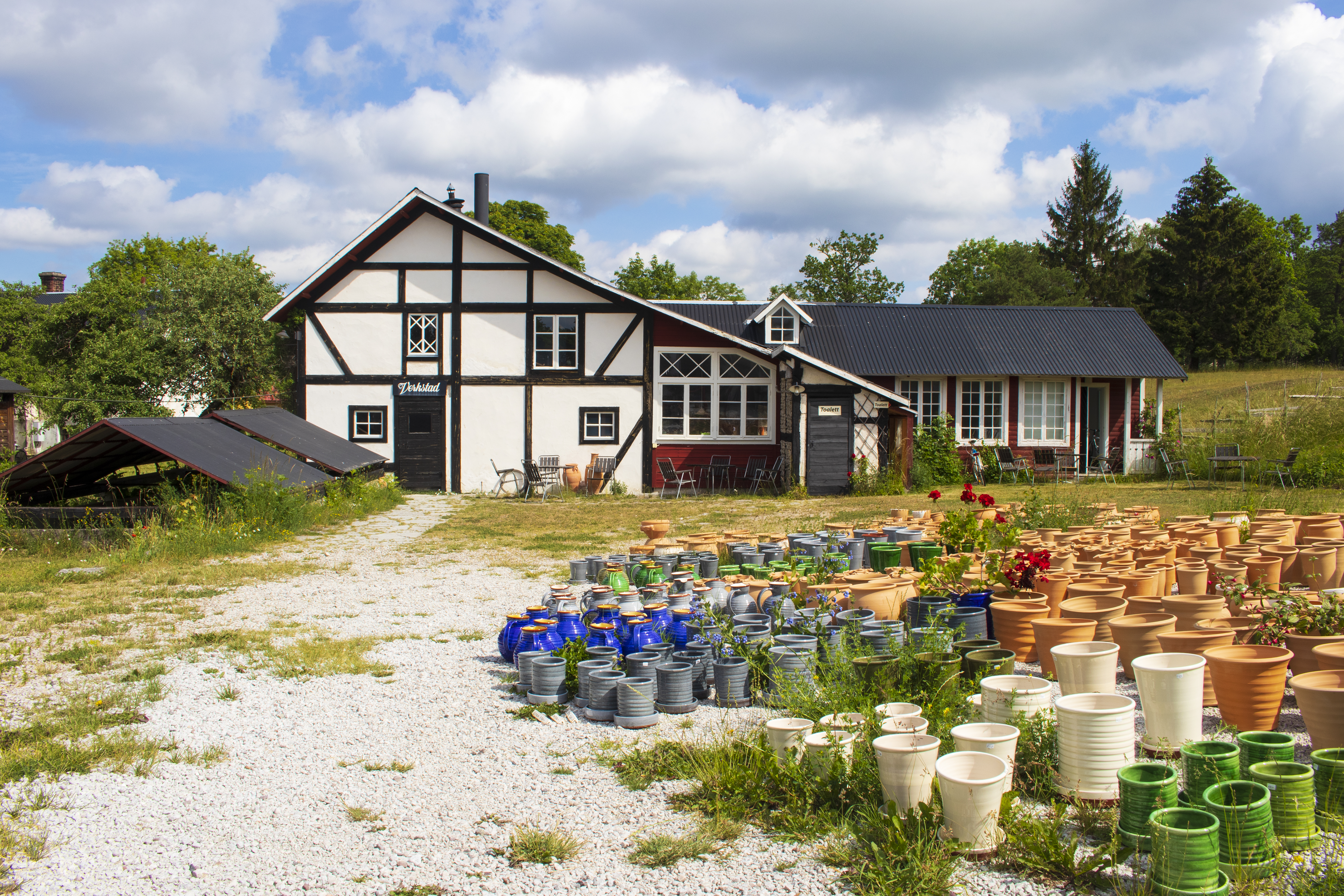 Olaría de Etelhems krukmakeri en Gotland.